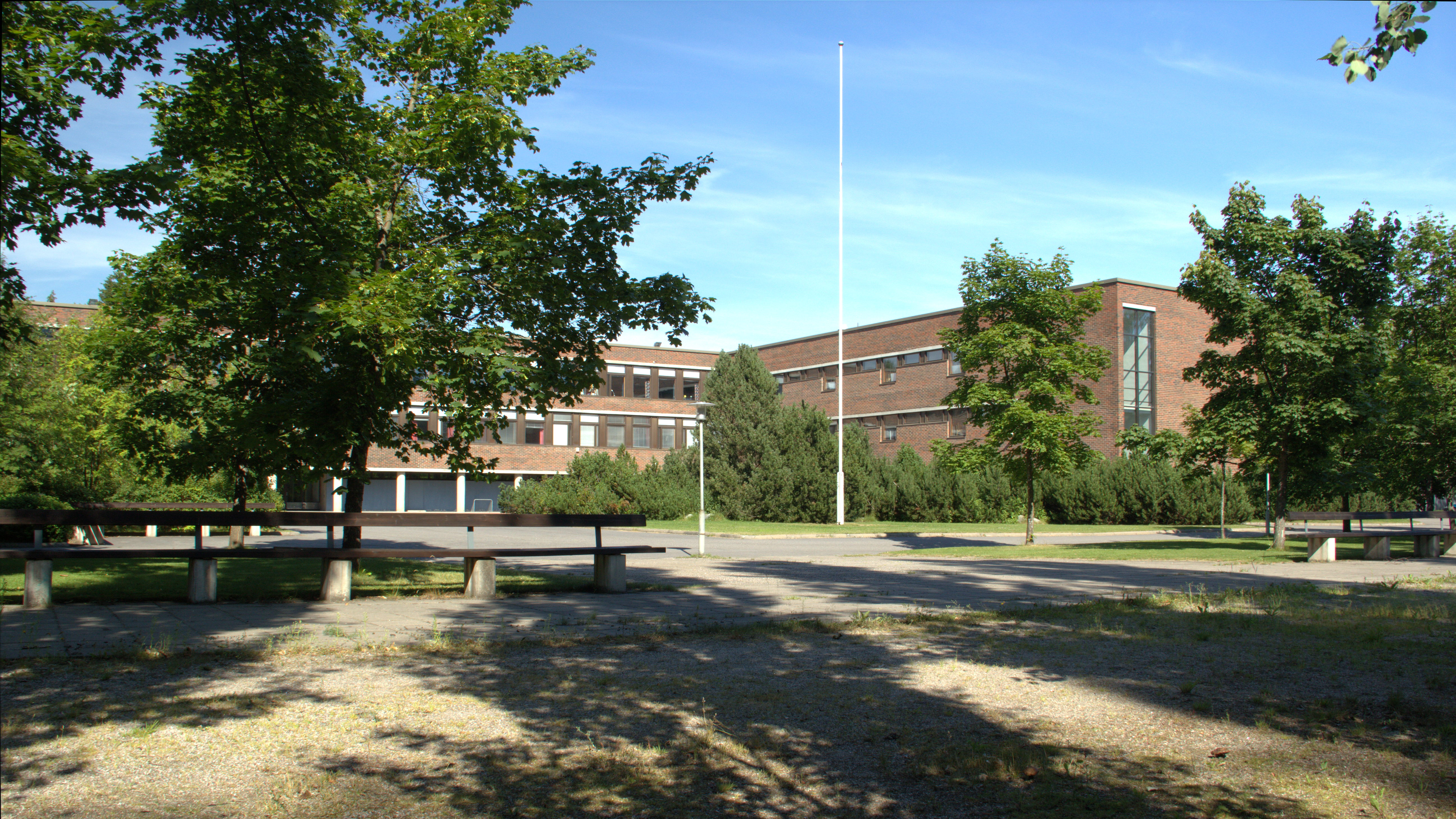 Helsingin yhteislyseo Kontulassa